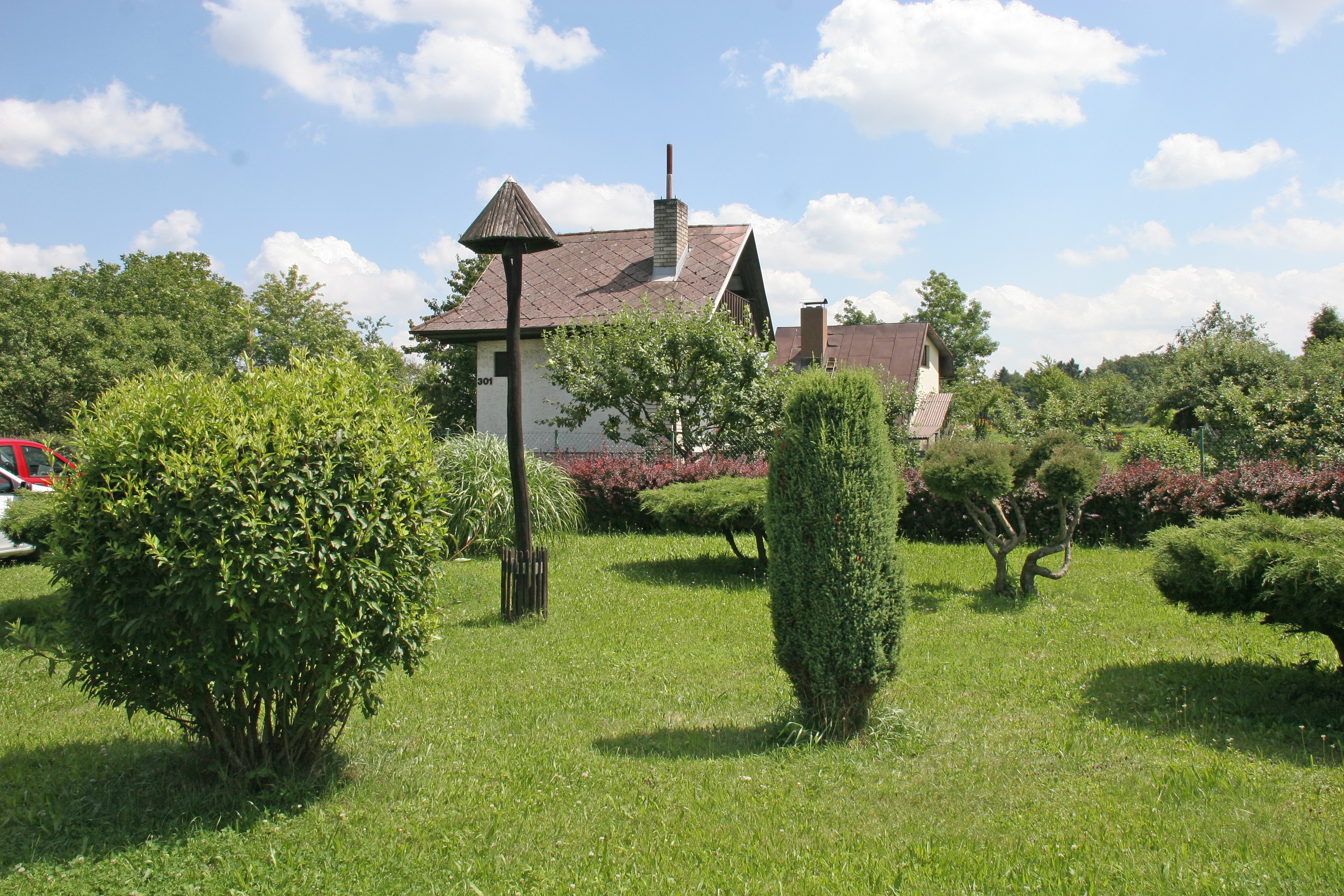 Tasovice zvonička